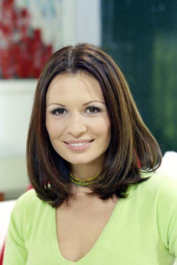 Leontine Borsato